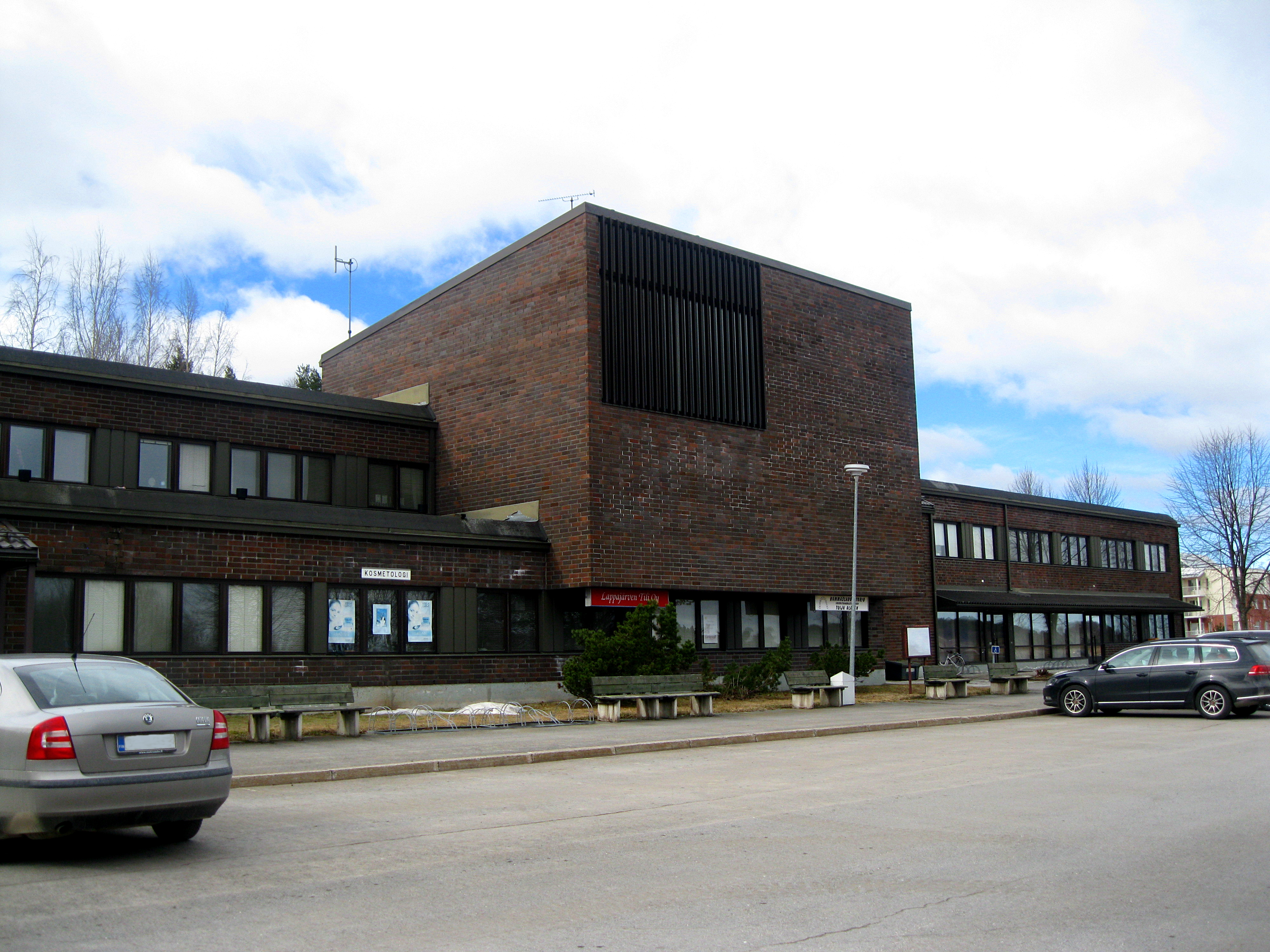 Lappajärven Virastotalo huhtikuussa 2015.